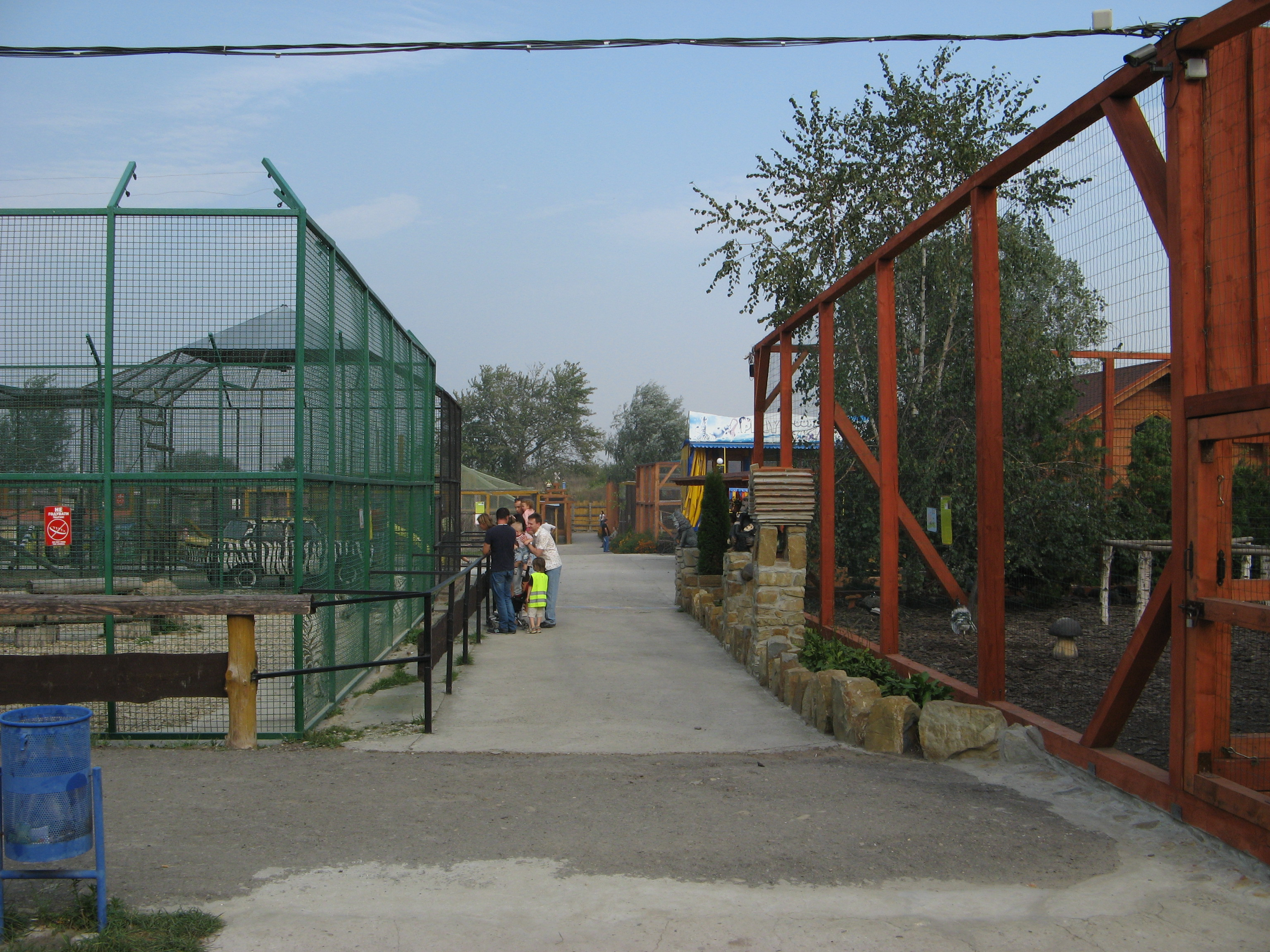 Меденицький зоопарк «Лімпопо» (Львівська обл.)